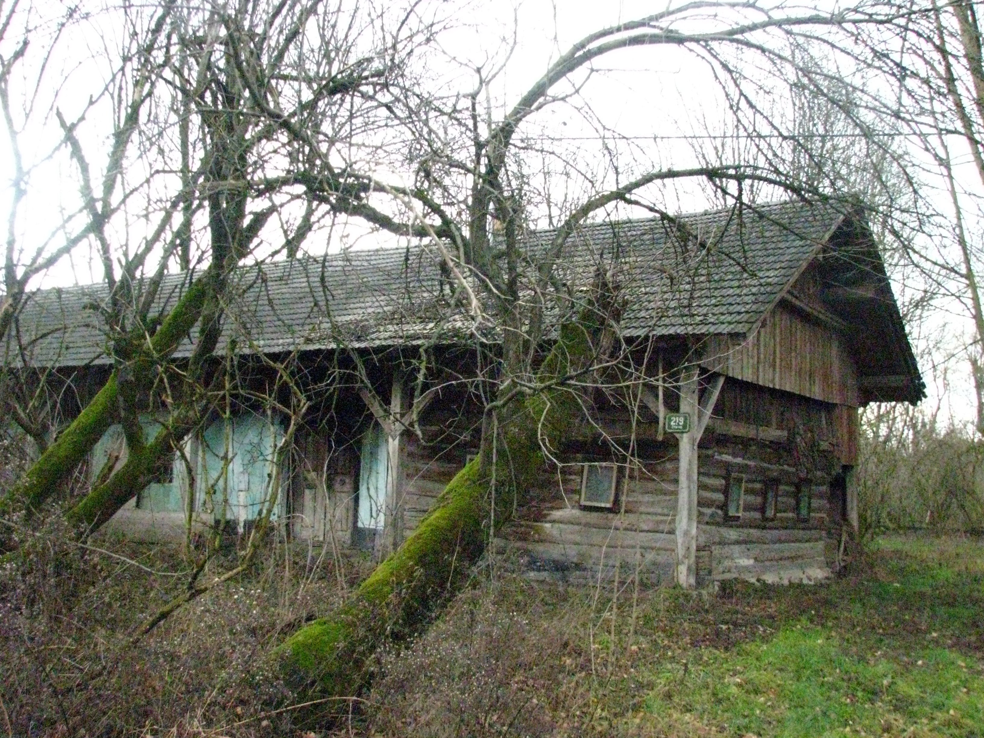 Tomaž house